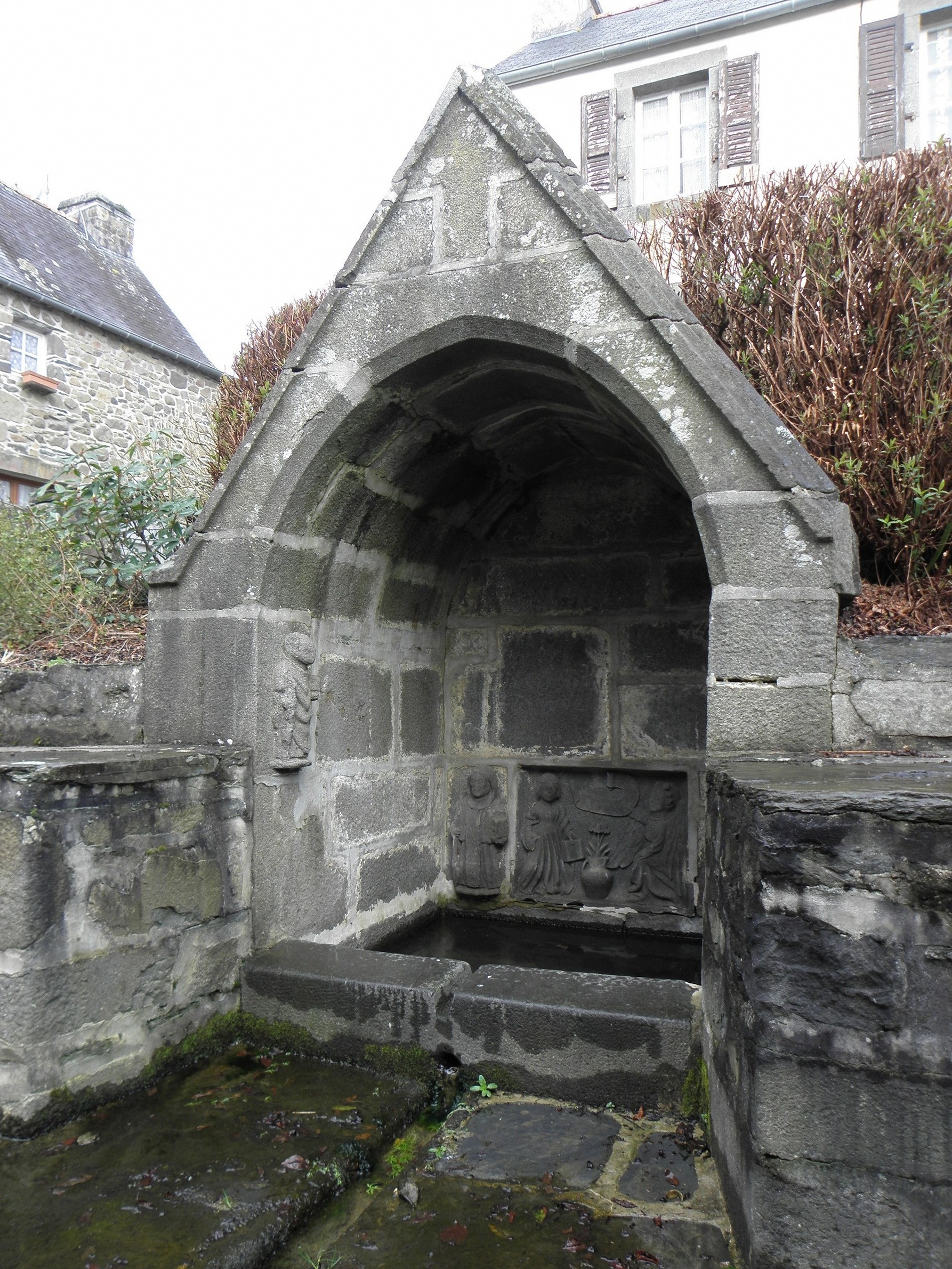 Fontaine de dévotion du sanctuaire de Rumengol, commune de Le Faou (29).